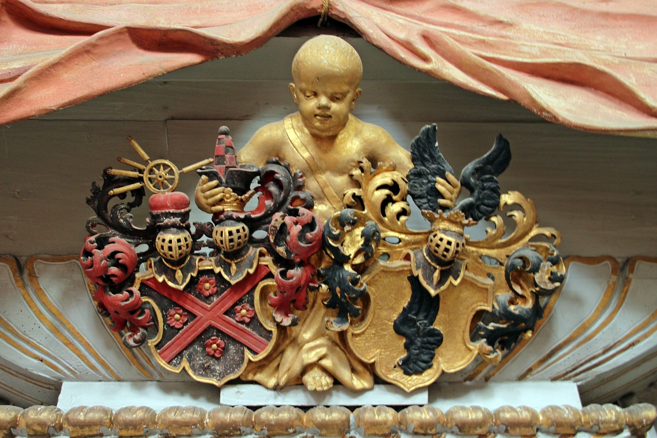 Hainewalde, evangelische Kirche: Wappen der Familien von Kanitz und Kyaw an der Herrschaftsloge. Die heutige Kirche ist wahrscheinlich der dritte Kirchenbau des Ortes. Die Grundsteinlegung erfolgte 1705, die Weihe 1711. Der Bau wurde durch den Einfall der Schweden in Sachsen von 1703 bis 1705 unterbrochen. Bauherren und Stifter der Kirche waren der kursächsische Obrist Otto Ludwig von Kanitz und seine Gattin Victoria Tugendreich von Kanitz geb. von Kyaw. Das Äußere der Kirche ist schlicht gehalten. Mit reichlich 50 Metern zählt der Turm zu den höchsten Dorfkirchtürmen der Oberlausitz. Die gesamte Kirchenausstattung befindet sich noch im ursprünglichen Zustand vom Anfang des 18. Jahrhunderts. Dies verleiht der Kirche einen besonderen kulturellen und kunsthistorischen Wert. (Am Kirchberg 6, Denkmal-Nr. 09271033, Sachgesamtheits-Nr. 09303500)